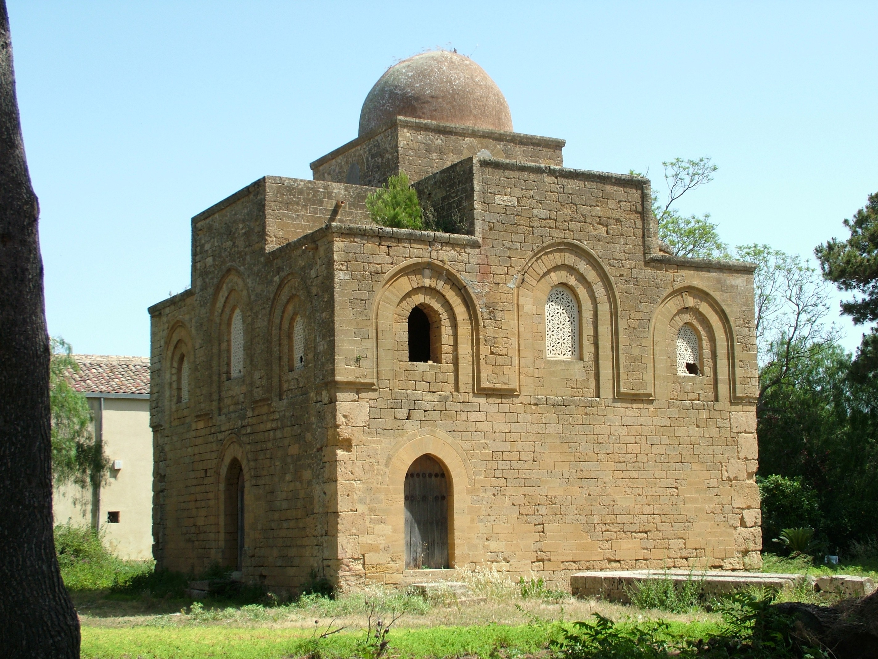 Castelvetrano, Sizlien, Chiesa di Santissima Trinità di Delia